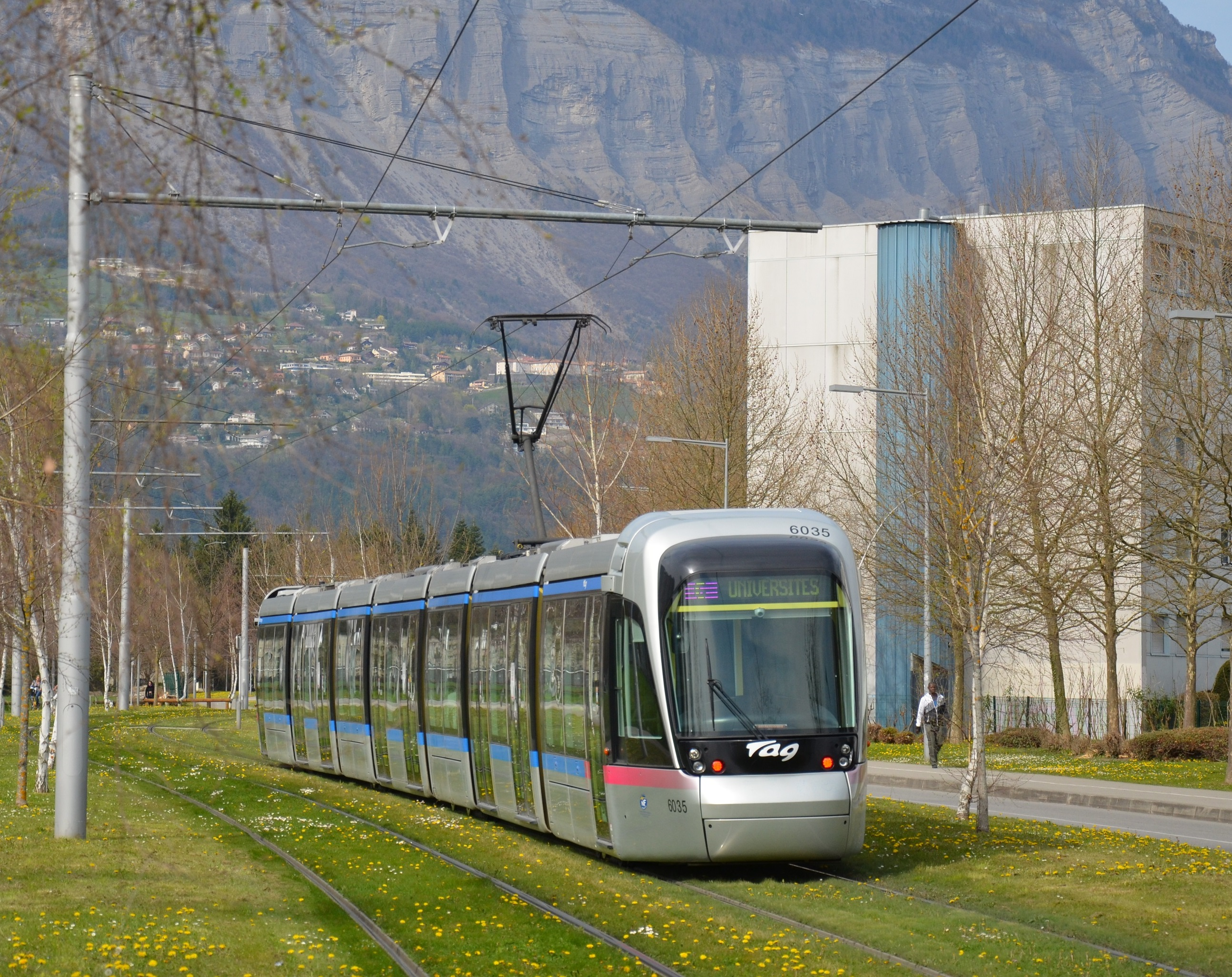 Alstom Citadis 402 n°6035 du réseau TAG de Grenoble près de la station Neyrpic Belledonne, sur la ligne C du tramway.